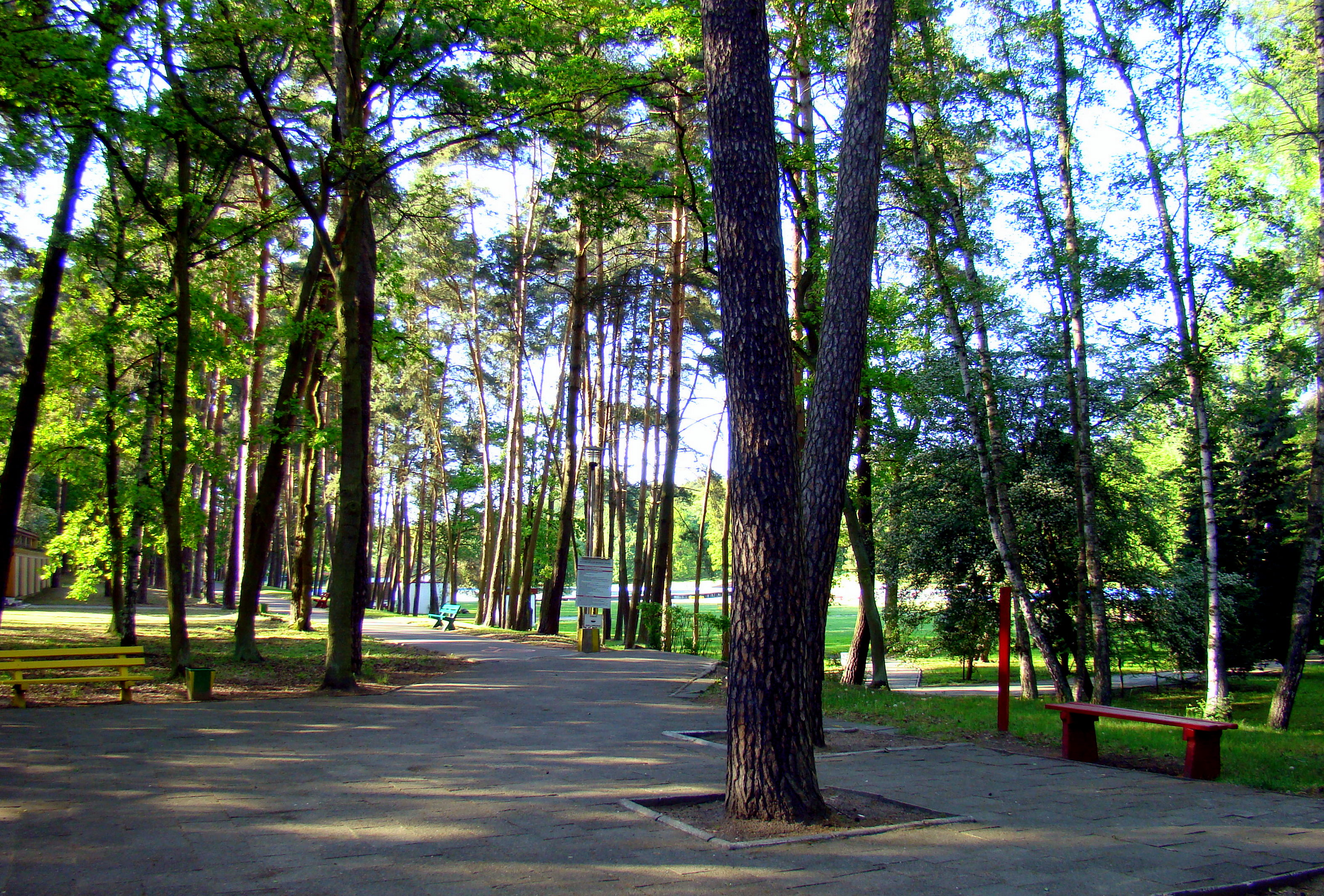 Arkonka (kąpielisko), Szczecin, Polska